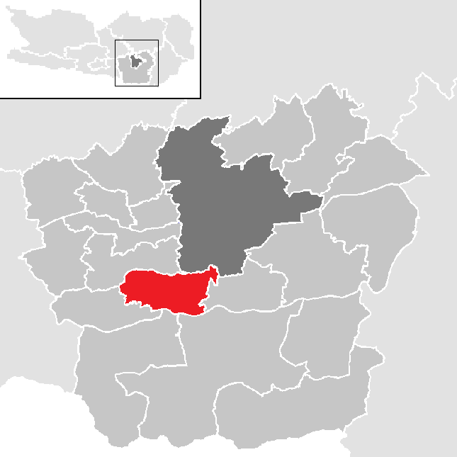 Bezirk Klagenfurt-Land